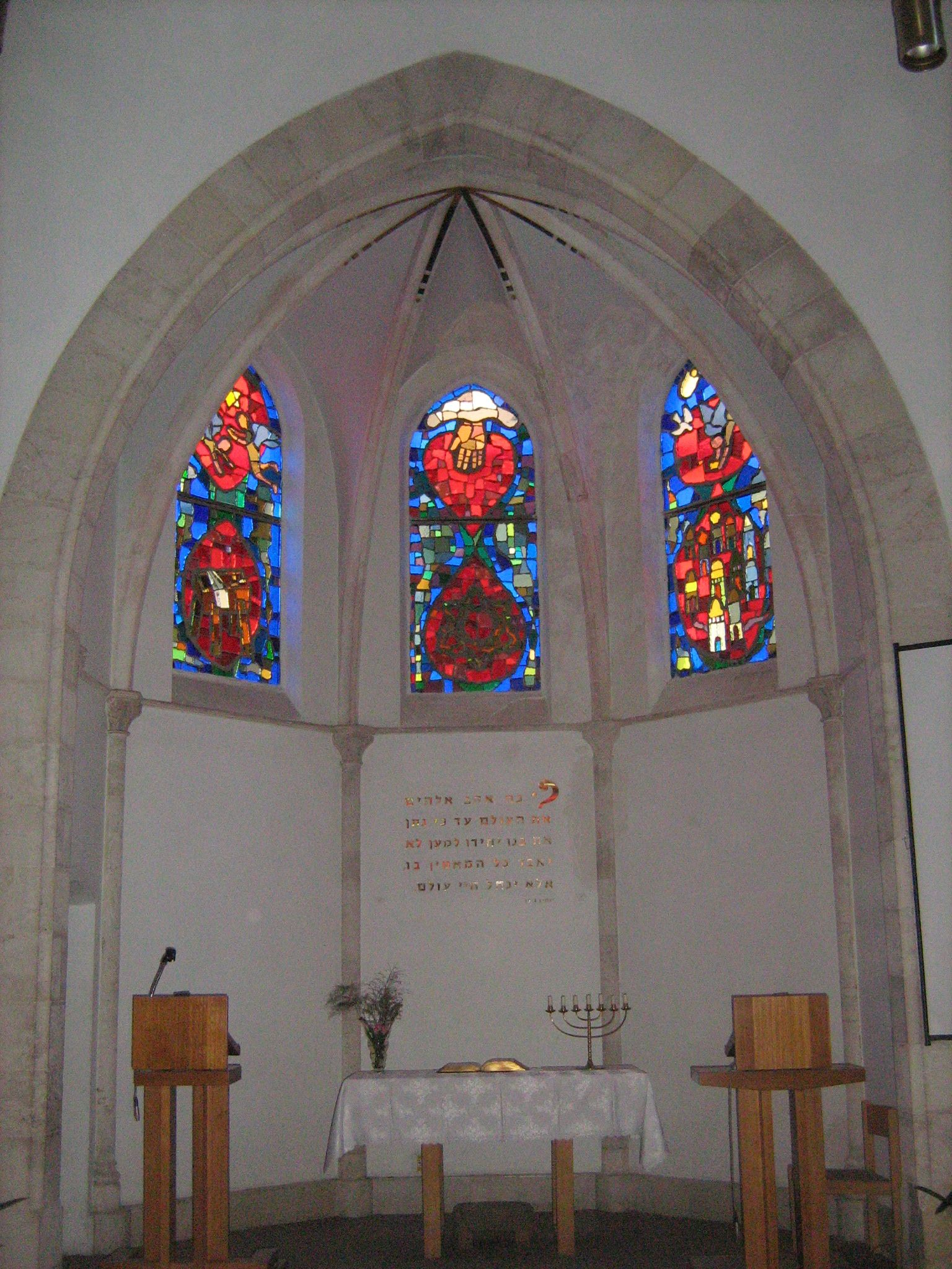 המושבה האמריקאית ביפו